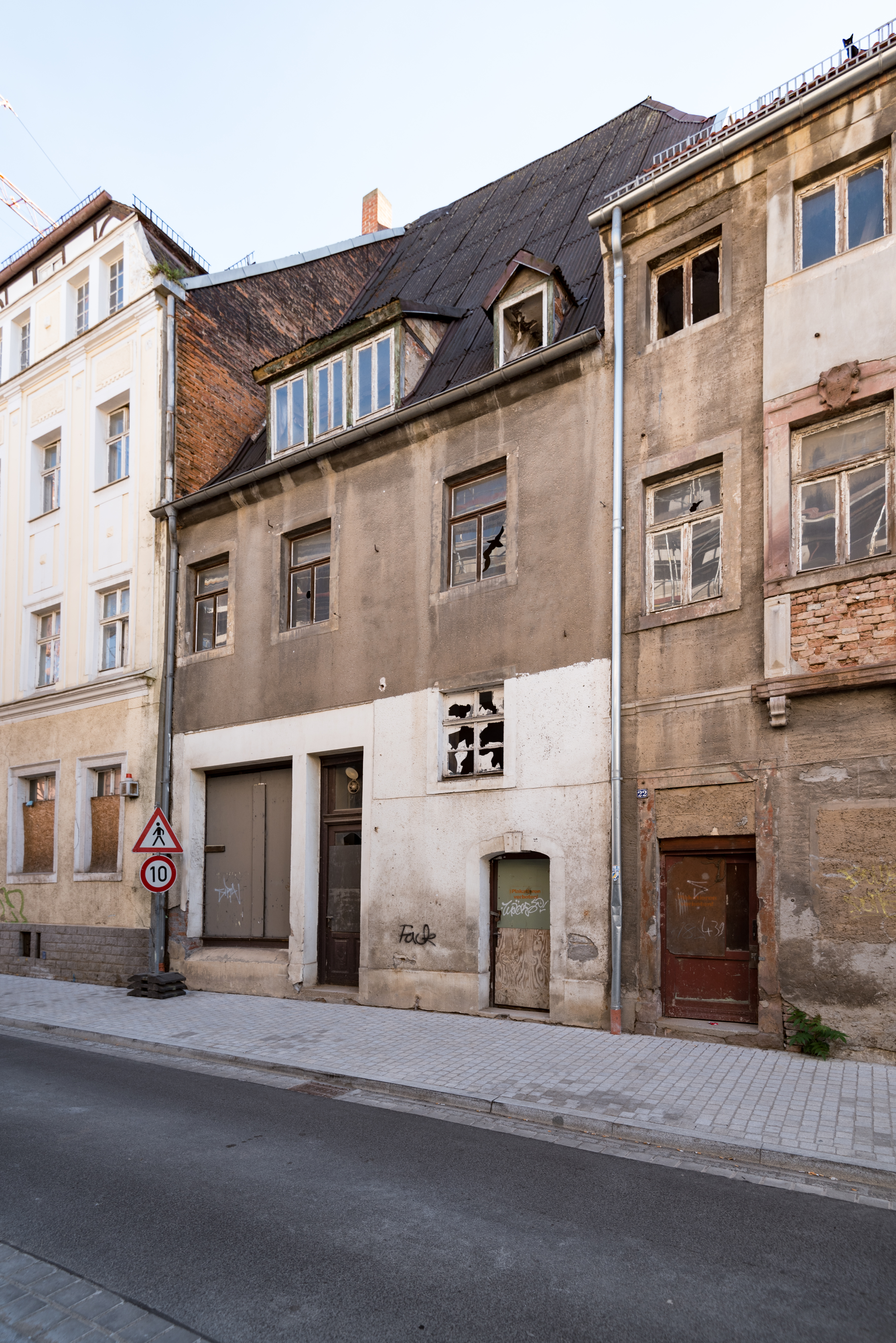 Weißenfels, Saalstraße 20